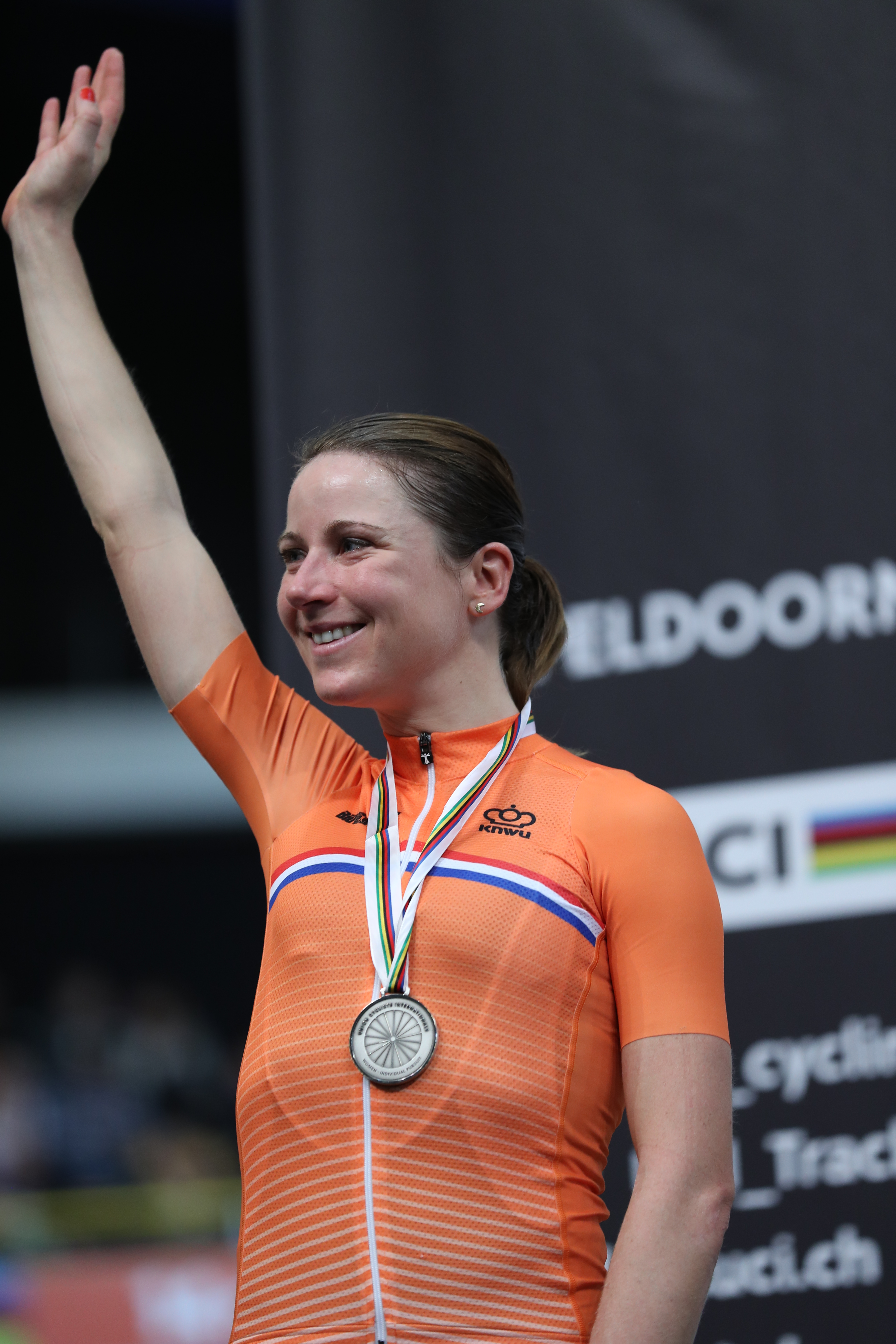 Annemiek van Vleuten, niederländische Radsportlerin - Silber in der Einerverfolgung